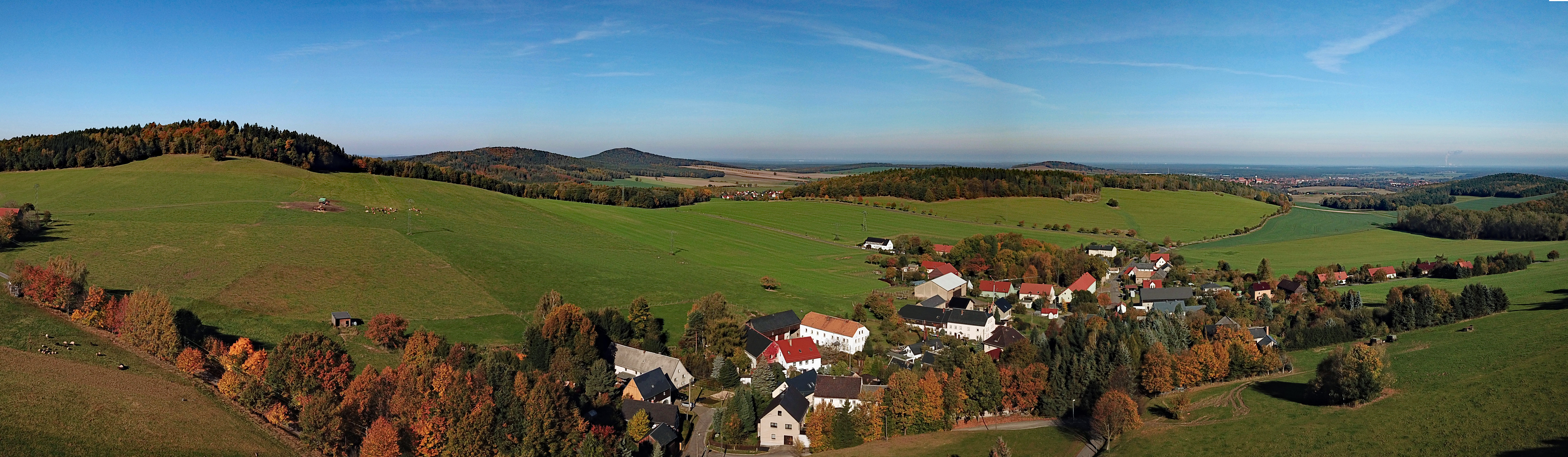 Hennersdorf (Kamenz) aus der Luft (Panorama, Blick nach Nordwesten)